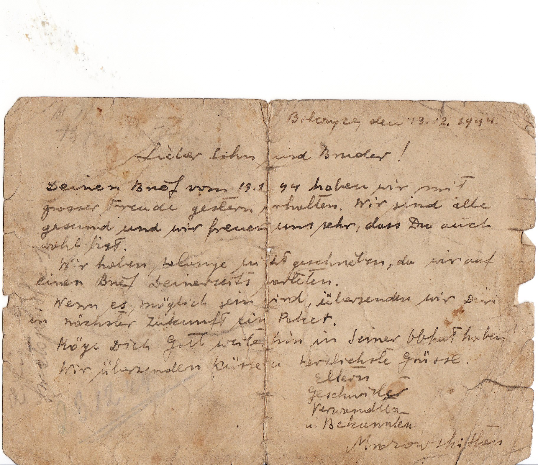 List z obozu Sachsenhausen